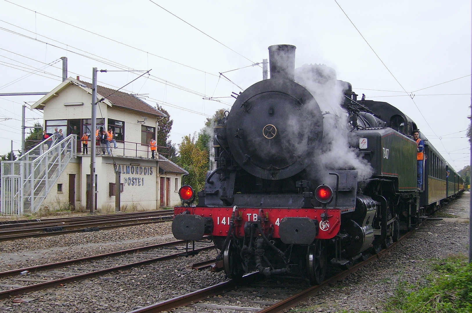 La 141 TB 407 à Valmondois le 3 octobre 2009.